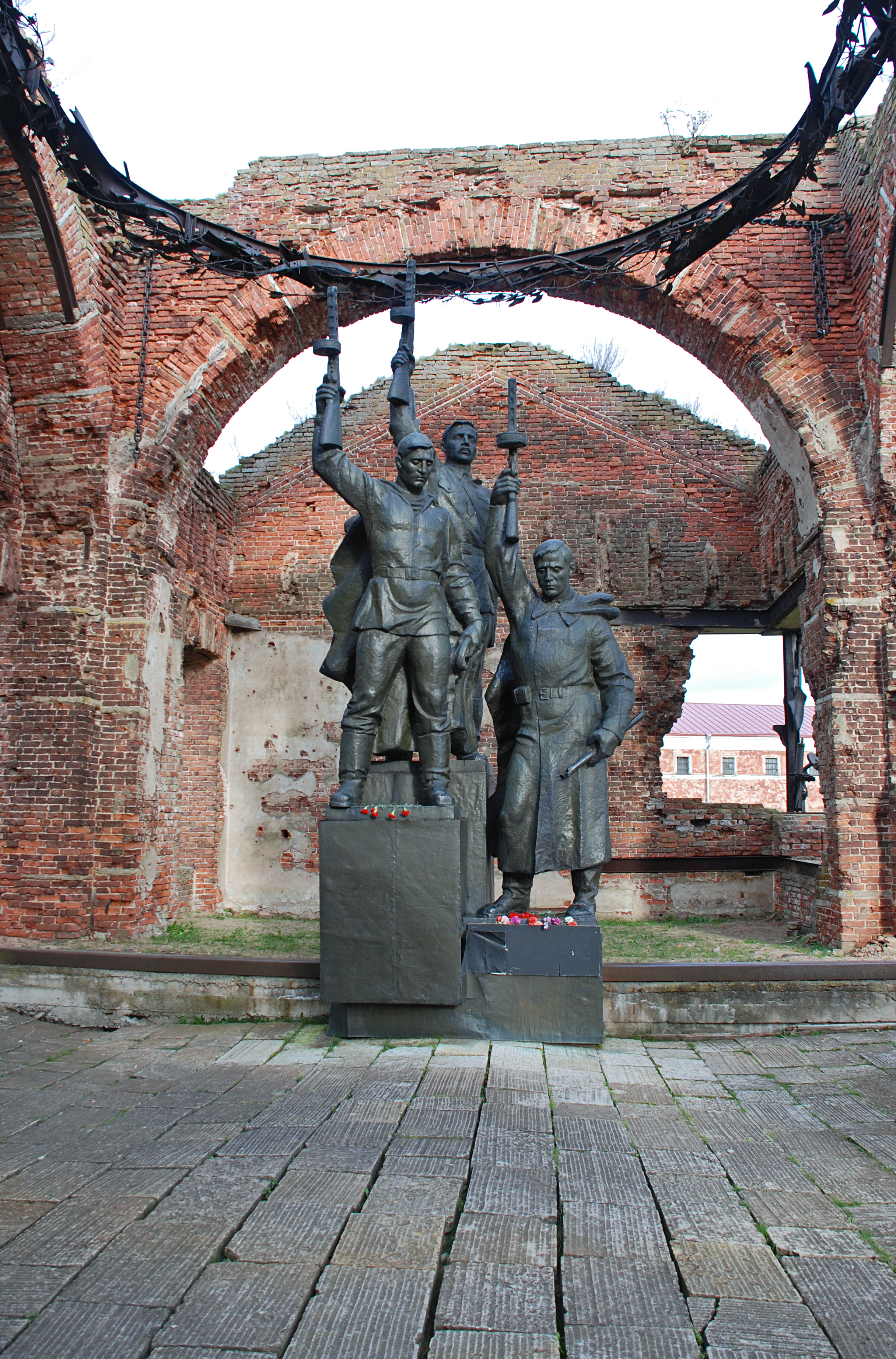 Памятник защитникам крепости Орешек (Лен.область, Шлиссельбург, крепость Орешек